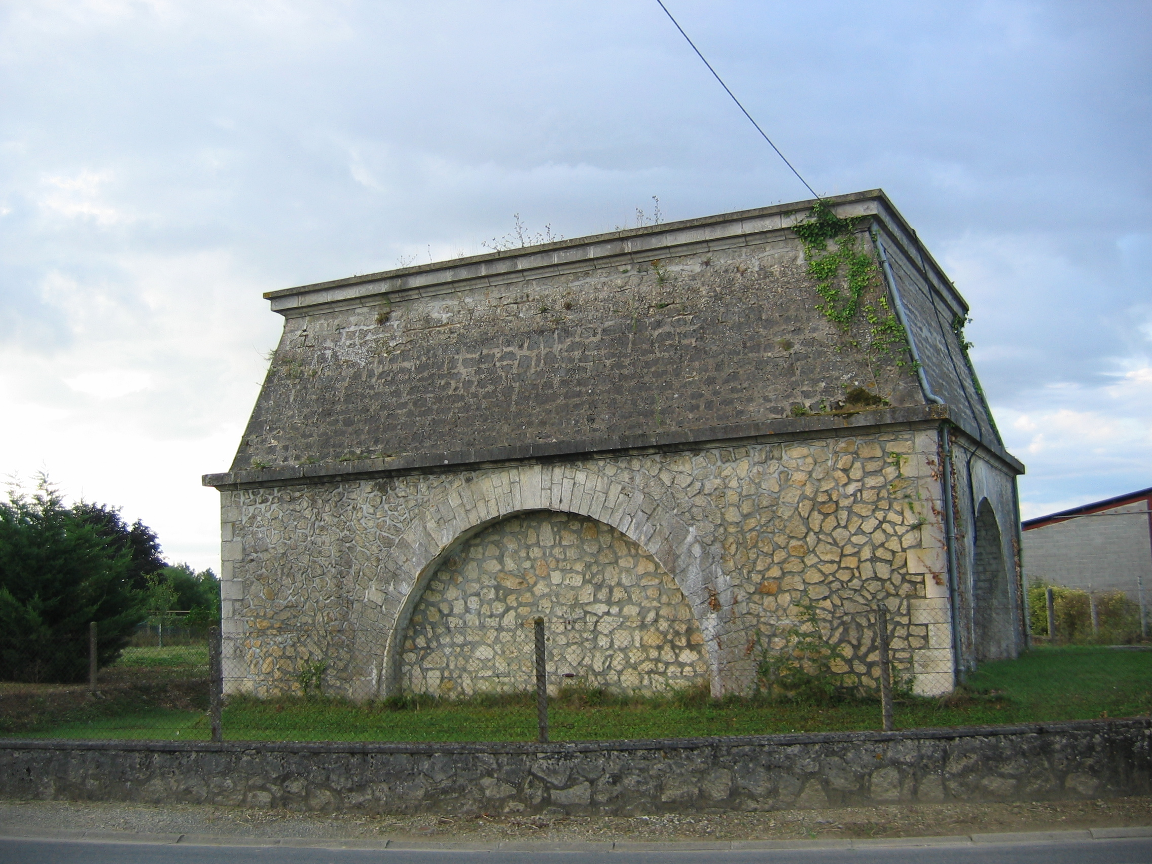 Construit au tout début du vingtième siècle, il est la deuxième réalisation dans le département sur ce modèle architectural.